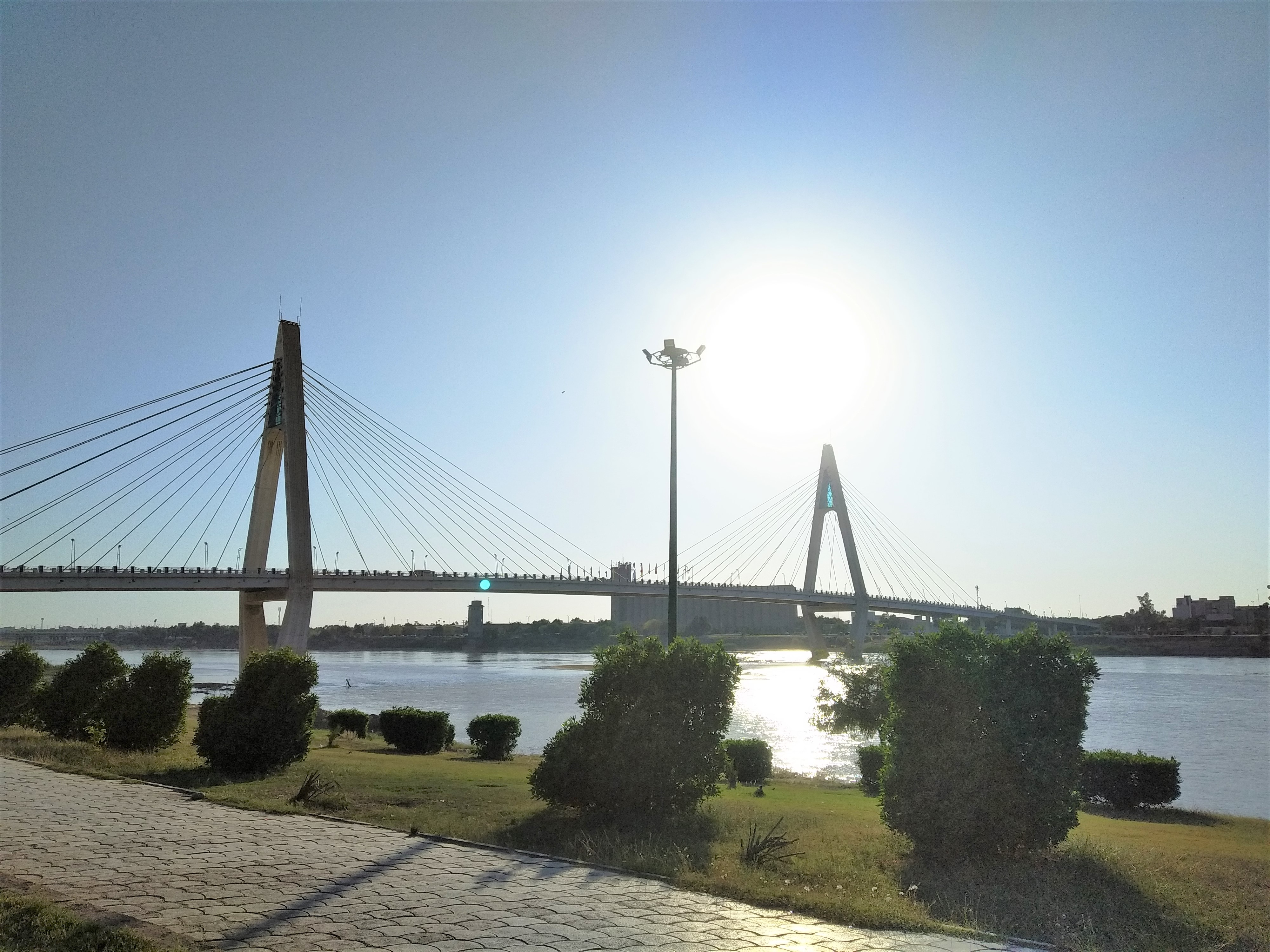 پل هشتم اهواز